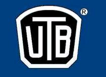 UTB-Logo (ehem. rumänischer Traktorenhersteller Uzina Tractorul Brașov)